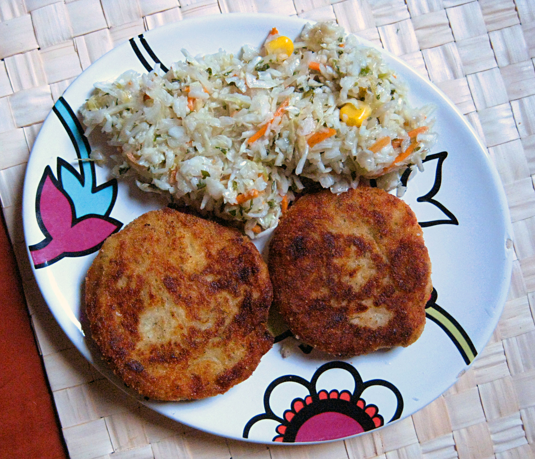 Kotlety ziemniaczane z serem feta